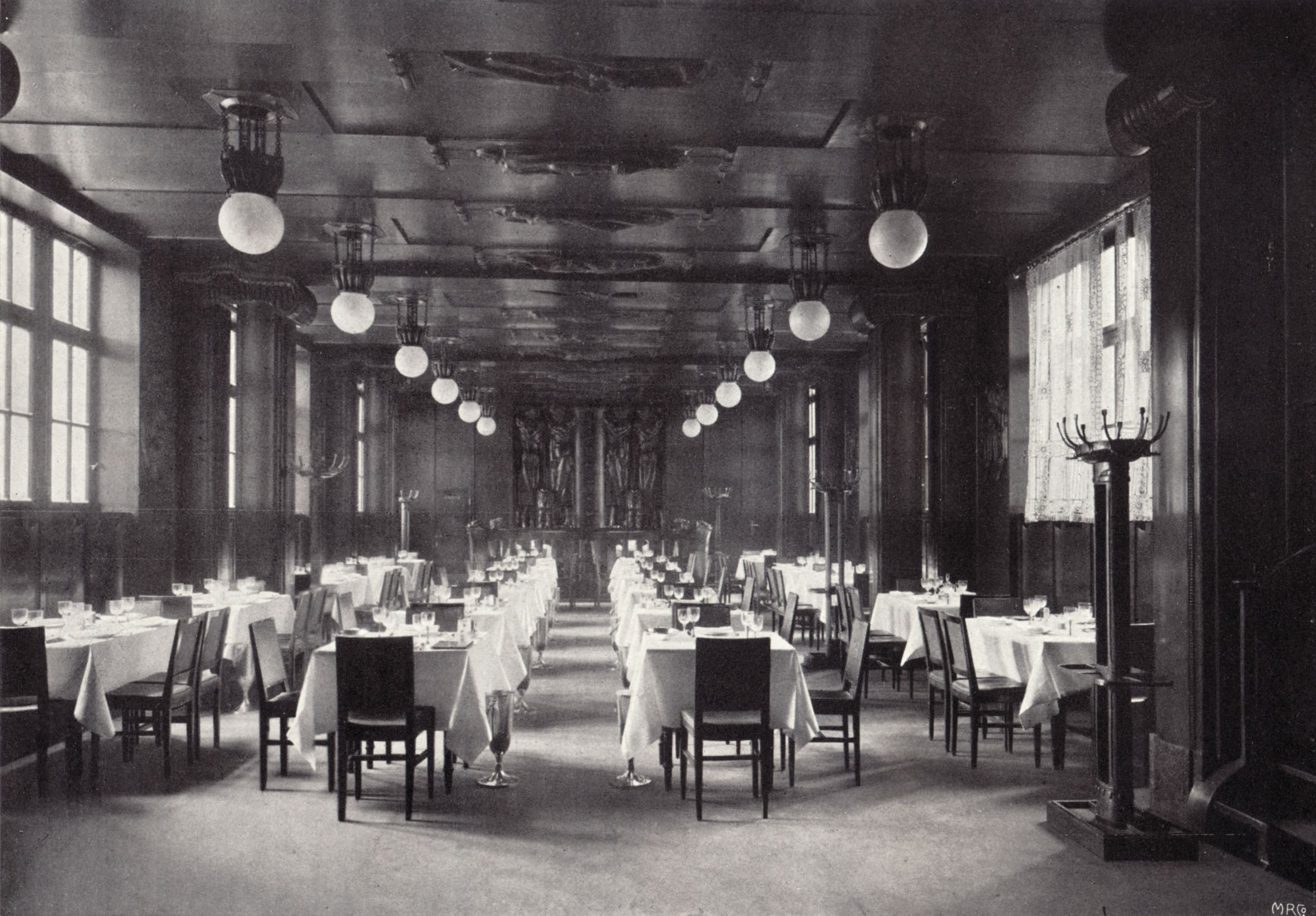 Berlin - Weinhaus Rheingold, Pfeilerrelief von Hermann Feuerhahn im Galeriesaals